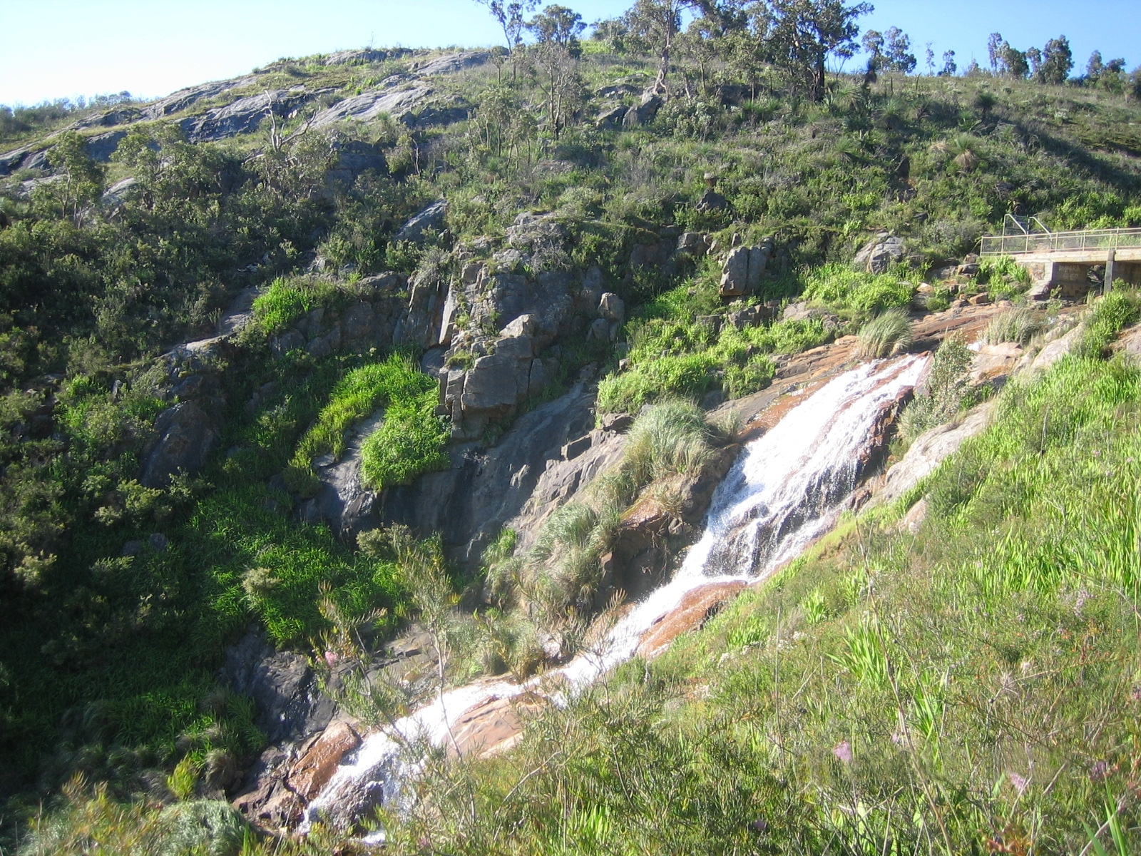 Lesmurdie Falls NP